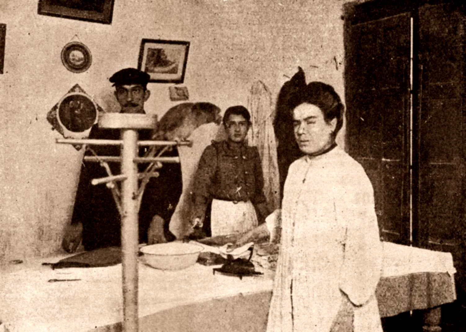 Juana Rouco Buela på arbetet.